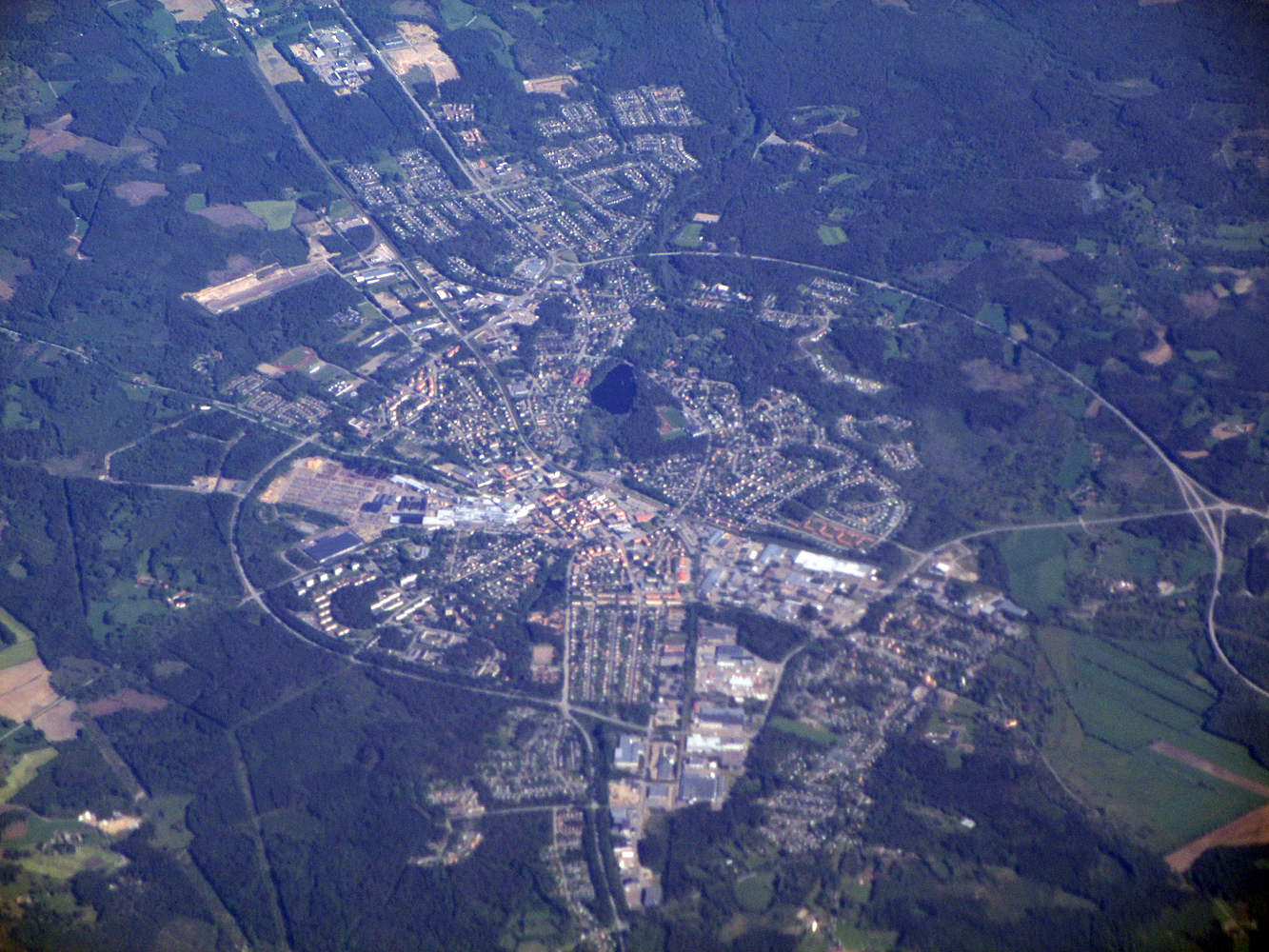 Stadt Nybro, Schweden